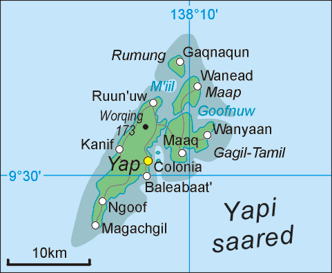 Yapi saared